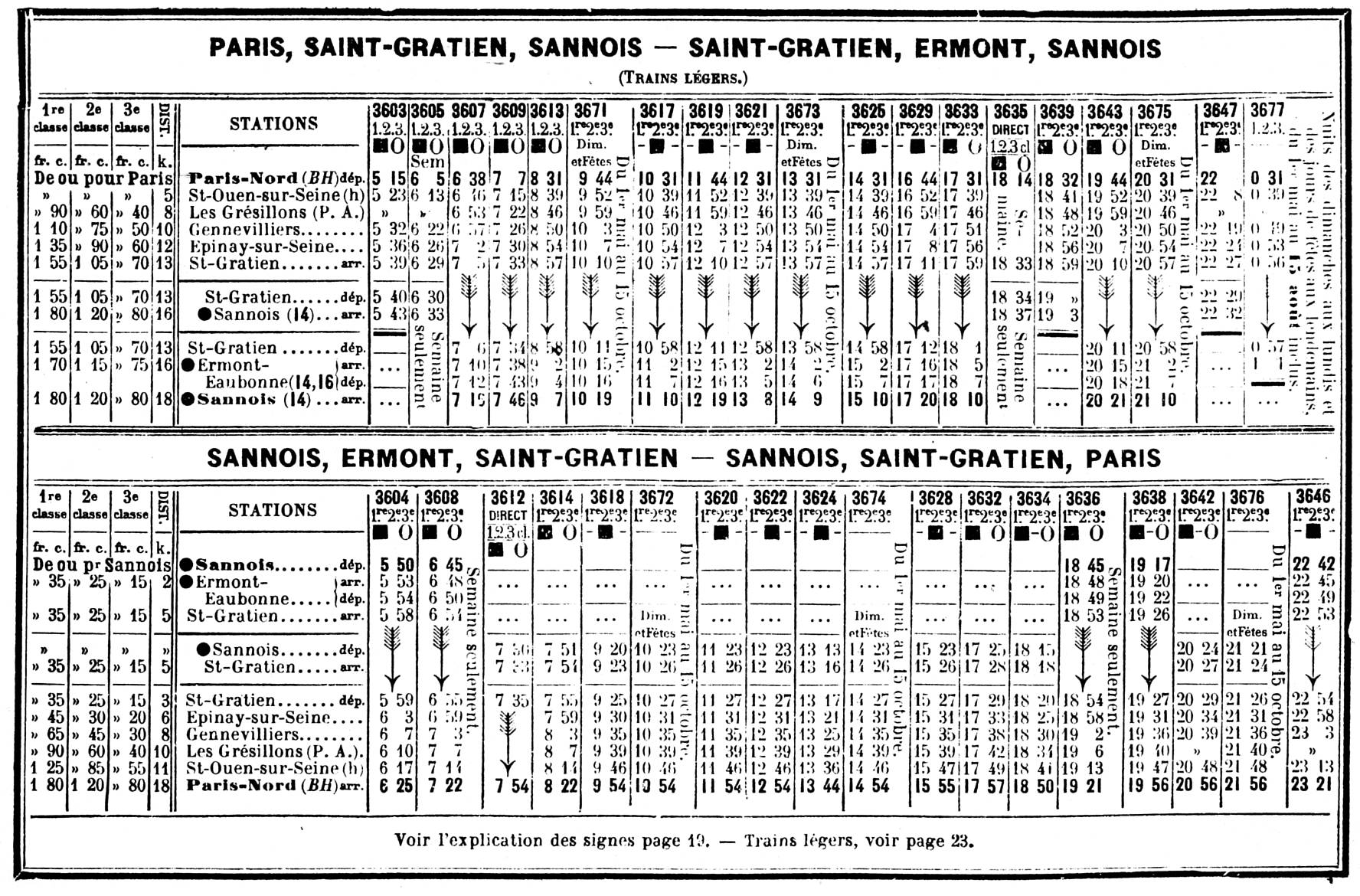 Tableau horaire de la ligne Gare du Nord - Saint-Gratien - Sannois - Ermont